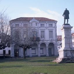 Ayuntamiento del concejo asturiano de Ribadedeva